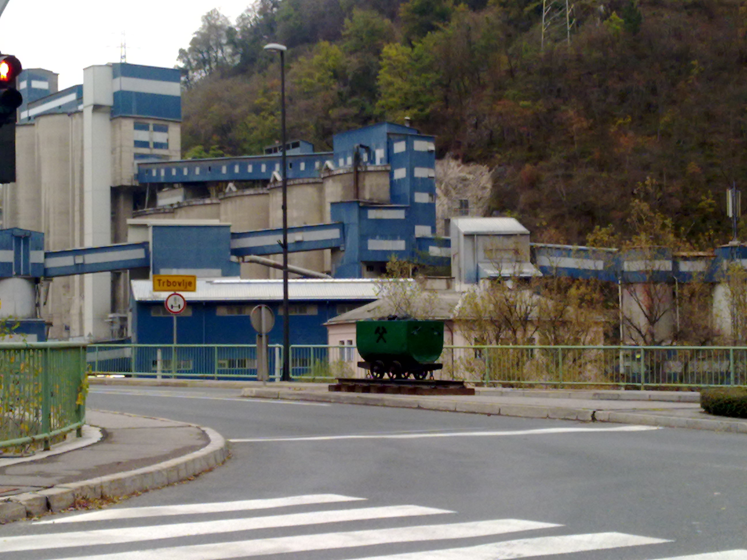 Lafarge cement Slovenija